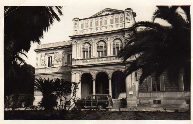 Veduta villa Bossio (ex Attias)